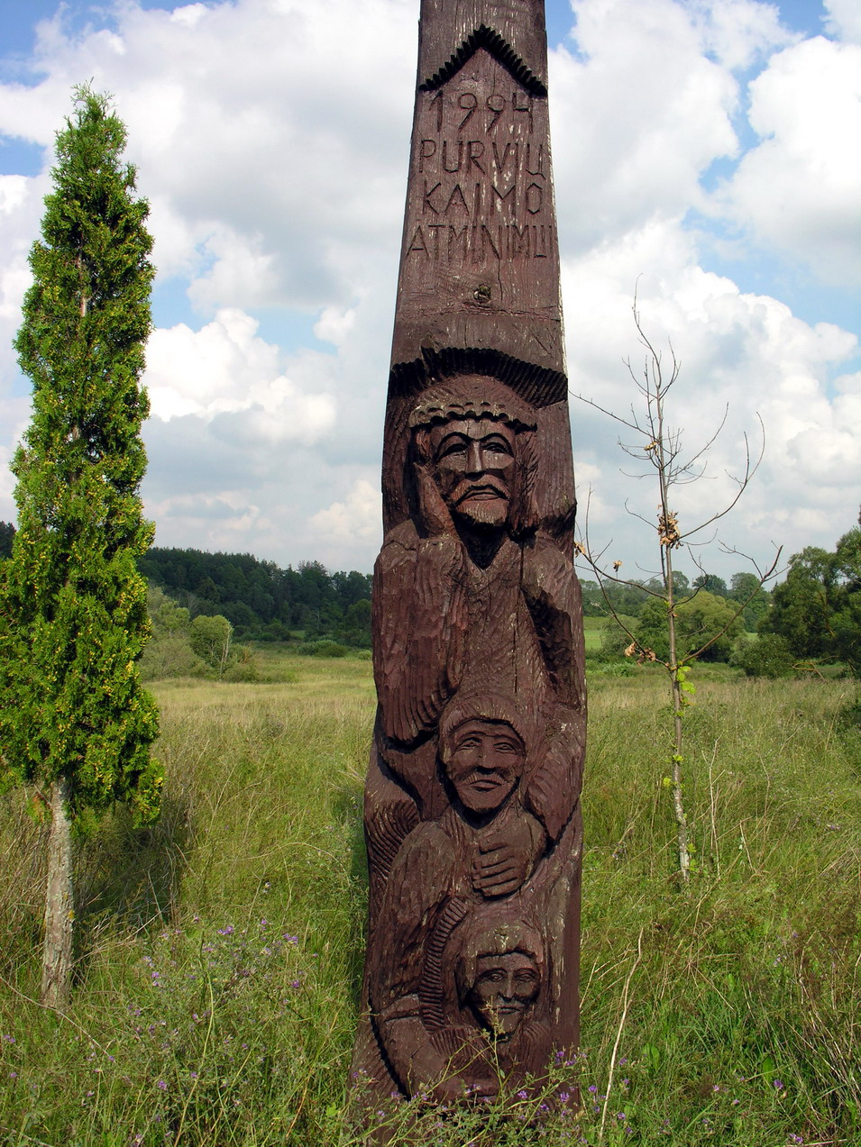 Purviai Kryžius Purvių kaimo gyventojų atminimui, past. 1994 m. Foto: Algirdas, 2006 m. rugpjūčio 15 d., Lietuva